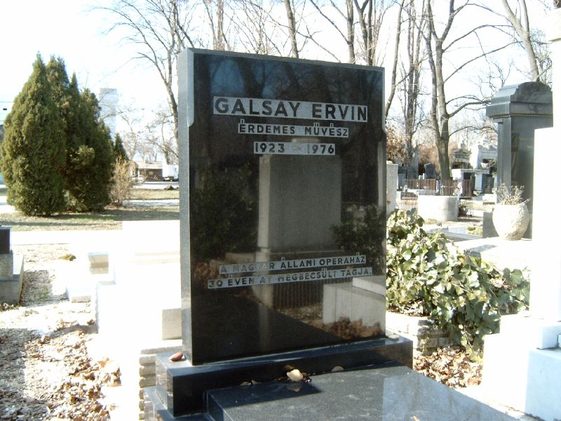 Galsay Ervin (Budapest, 1923. június 9. – Budapest, 1976. dece,ber 15.) operaénekes (basszus) sírja Budapesten. Kozma utcai izraelita temető: 4A.